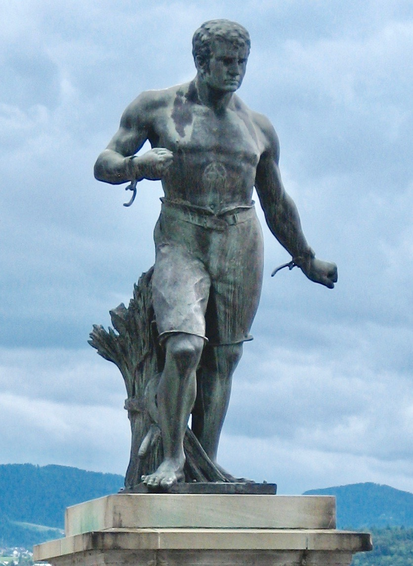 Denkmal Stäfner Handel (Demokratiebewegung) von 1794/95, Ausschnitt. Juni 2009.